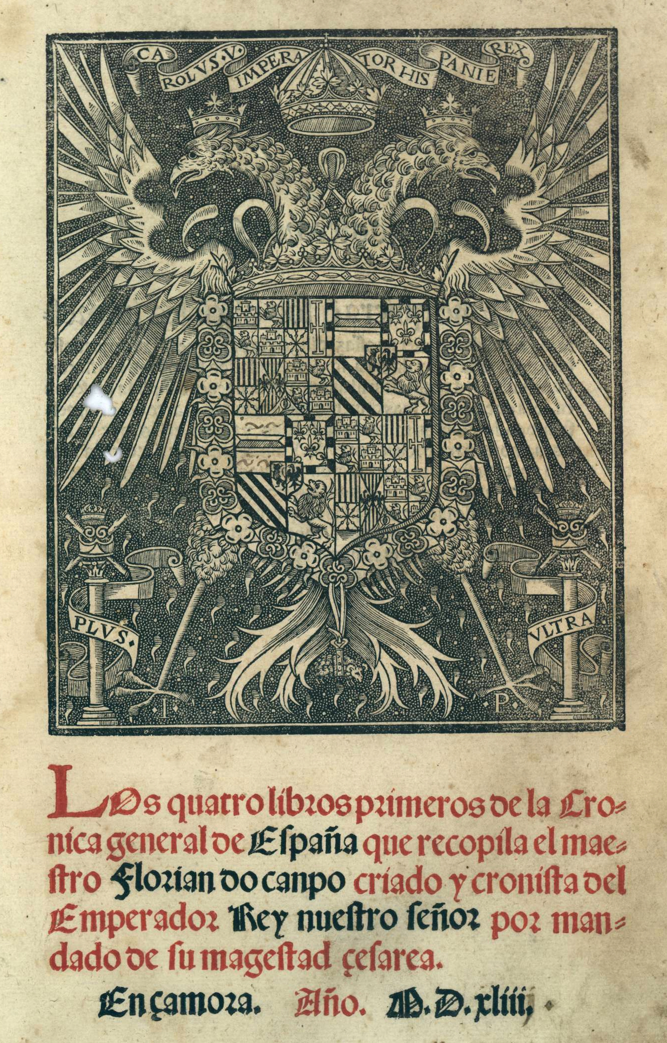 Florián de Ocampo, Los cuatro libros primeros de la crónica general de España que recopila el maestro Florián de Ocampo, criado y cronista del emperador rey nuestro señor por mandado de su magestad cesárea [=Crónica general de España], Zamora, Juan Picardo; a expensas de Juan Pedro Mussetti, 1543.